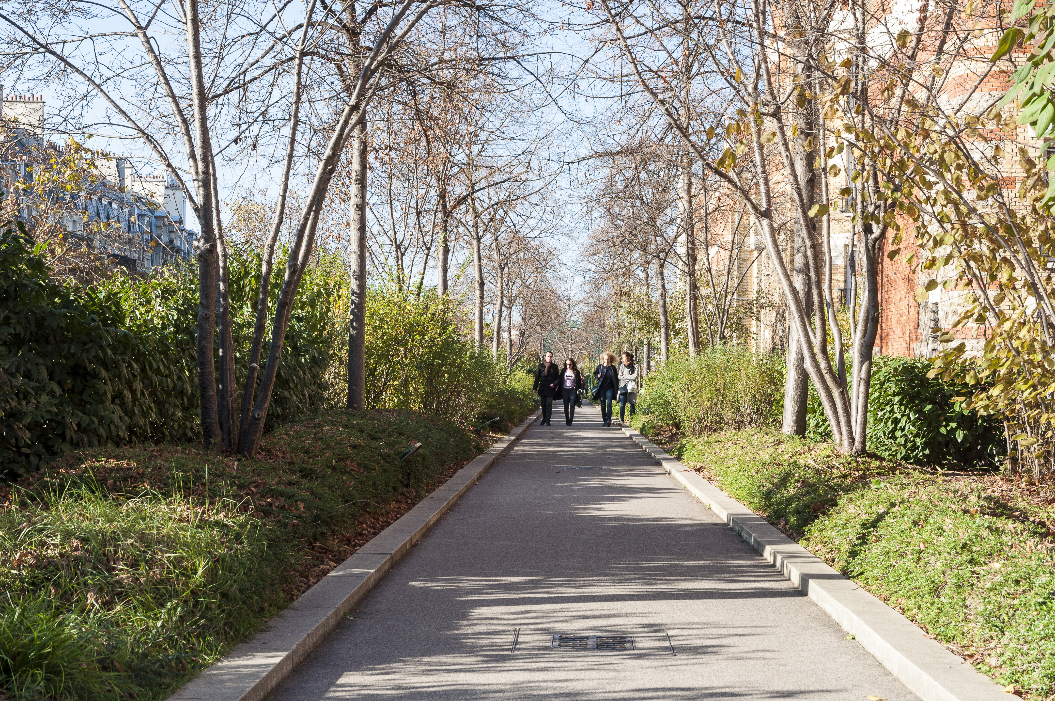 Coulée verte René-Dumont, anciennement dénommée "Promenade plantée".